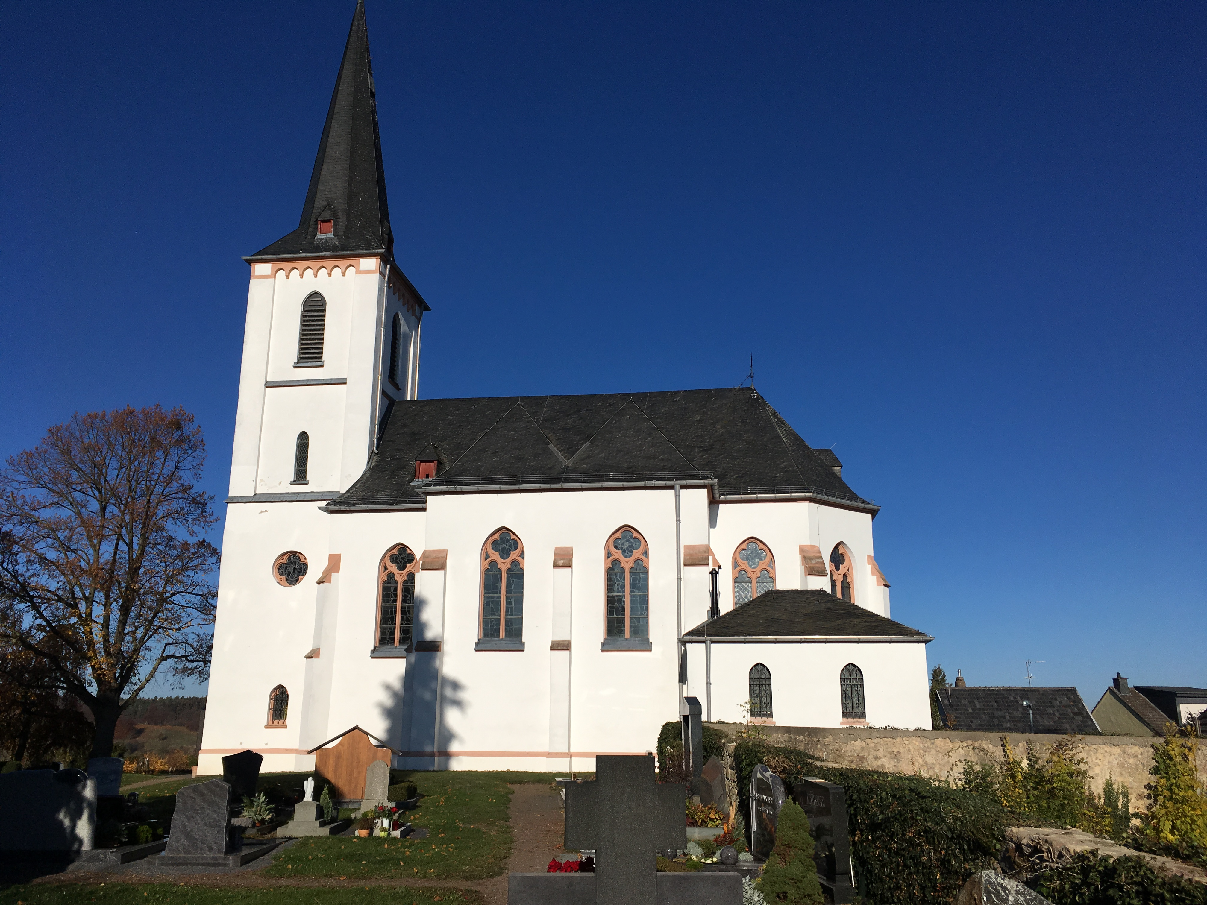 Die Pfarrkirche St. Margareta ist eine Hallenkirche in Eschweiler, Bad Münstereifel. Sie wurde in den Jahren 1901 und 1902 auf einem Vorgängerbau errichtet. Die Fenster stammen von den Glasmalern Hermann Gottfried sowie Heinrich Oidtmann II.